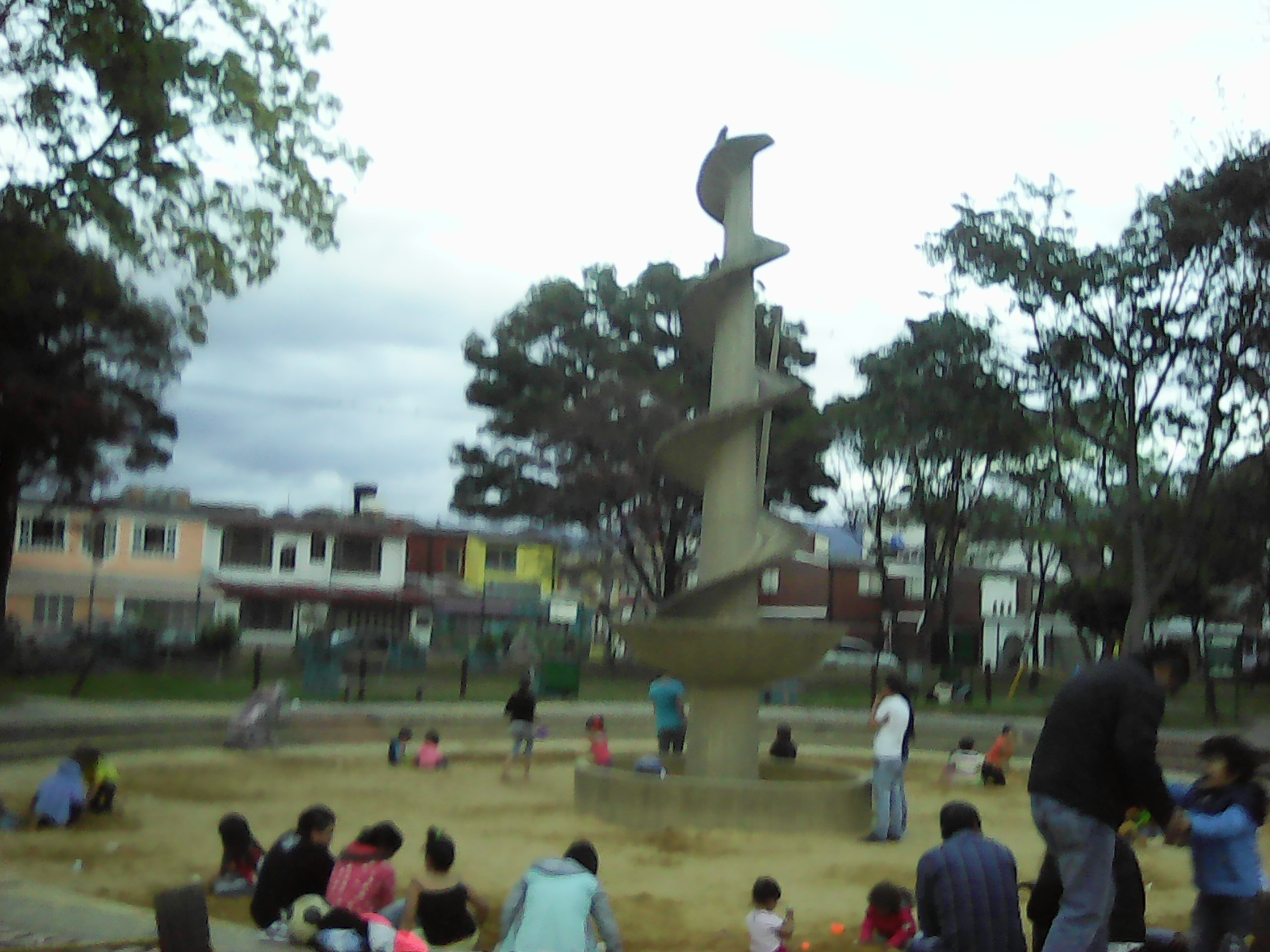 Parque Ciudad Montes